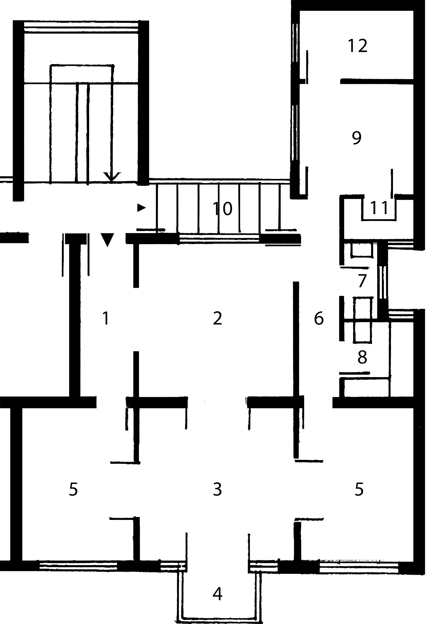 Tipičan primer salonskog stana